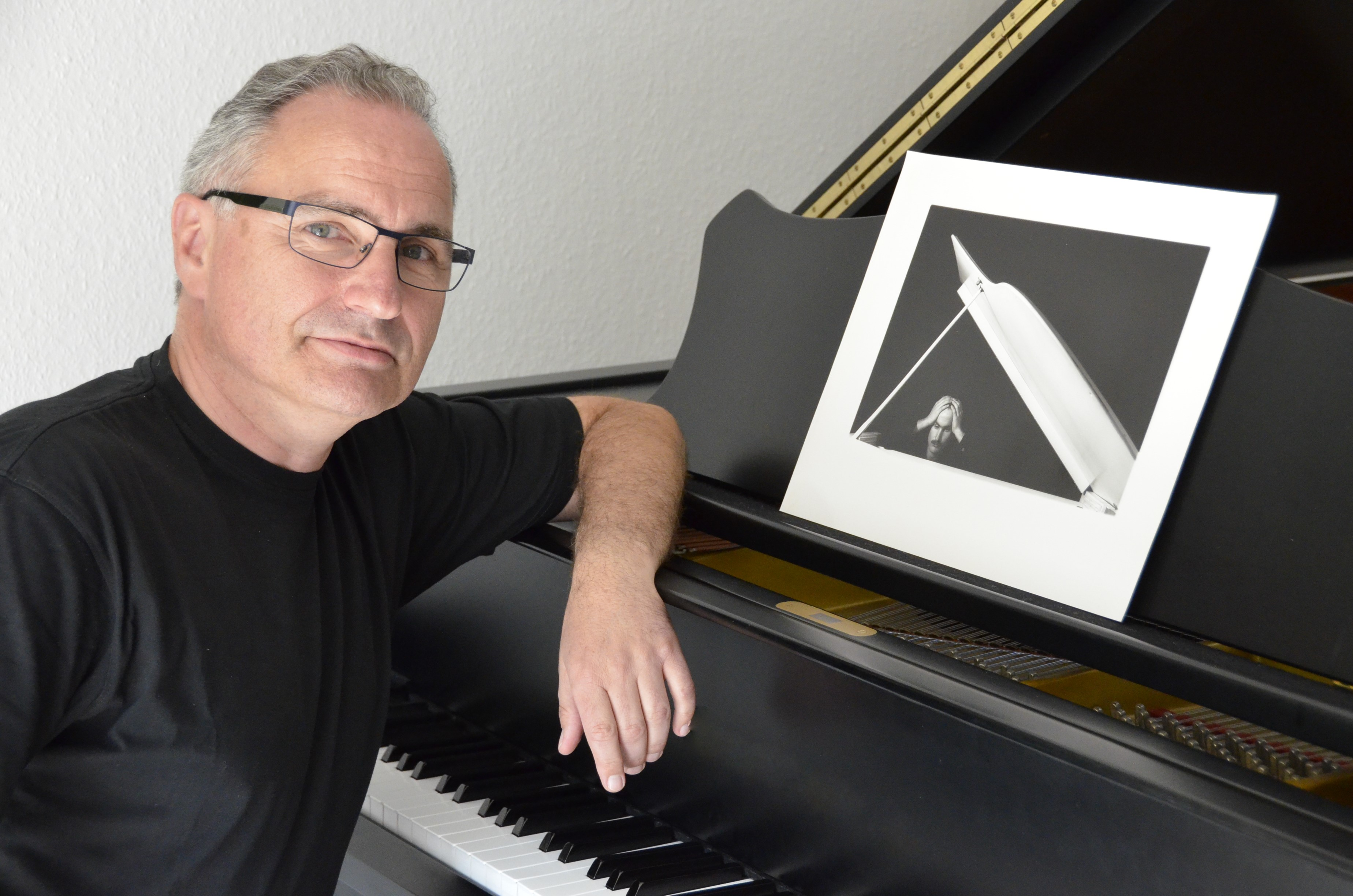 Komponist Volkmar Studtrucker, Foto: Roland Böhringer